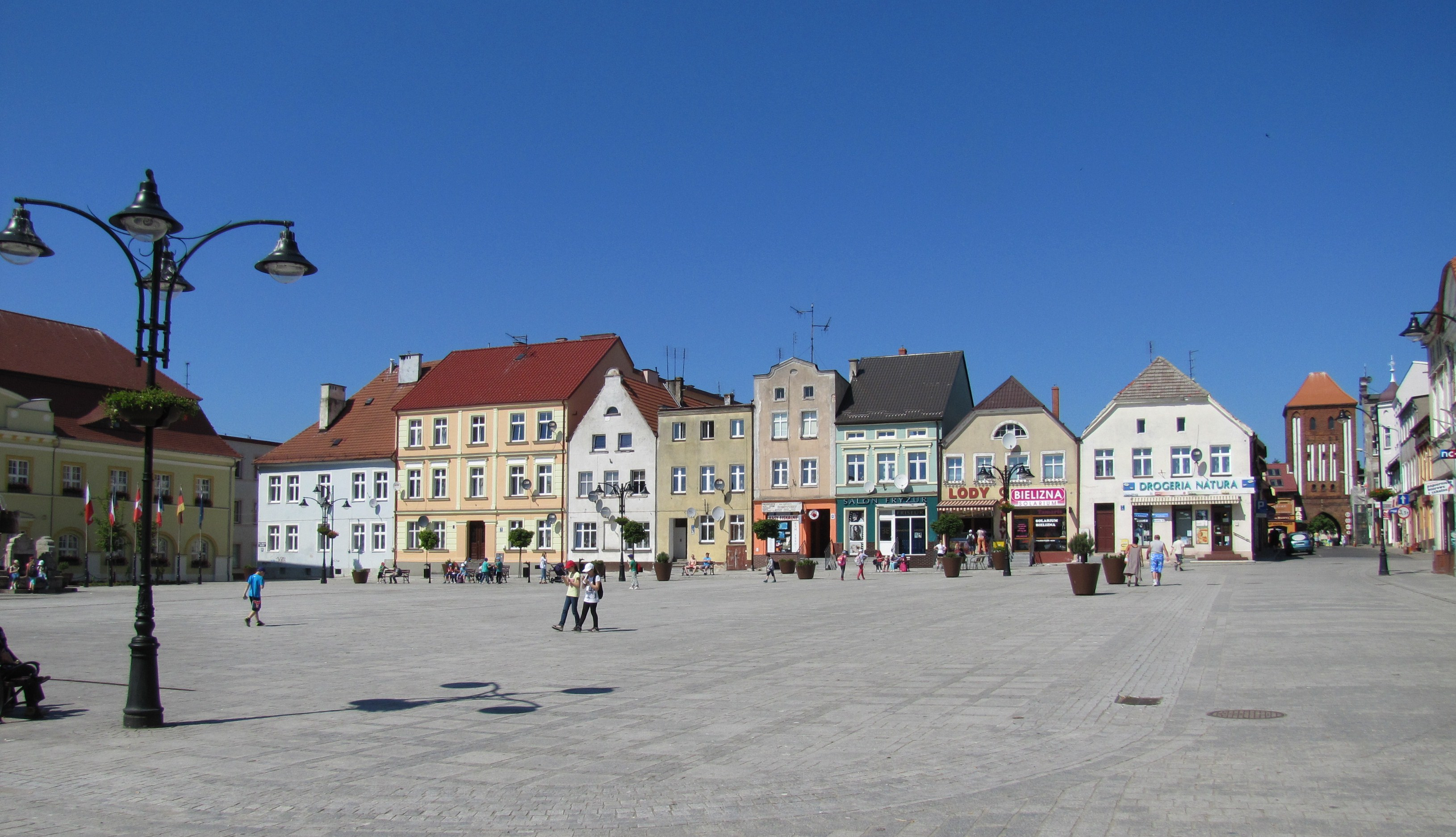 Rynek Starego Miasta.